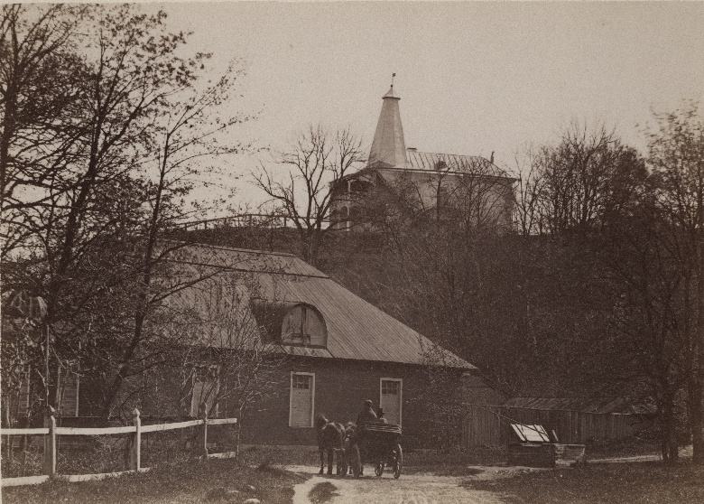 Muuseumikogu fotod Olemus foto Originaal originaal Säilivus hea